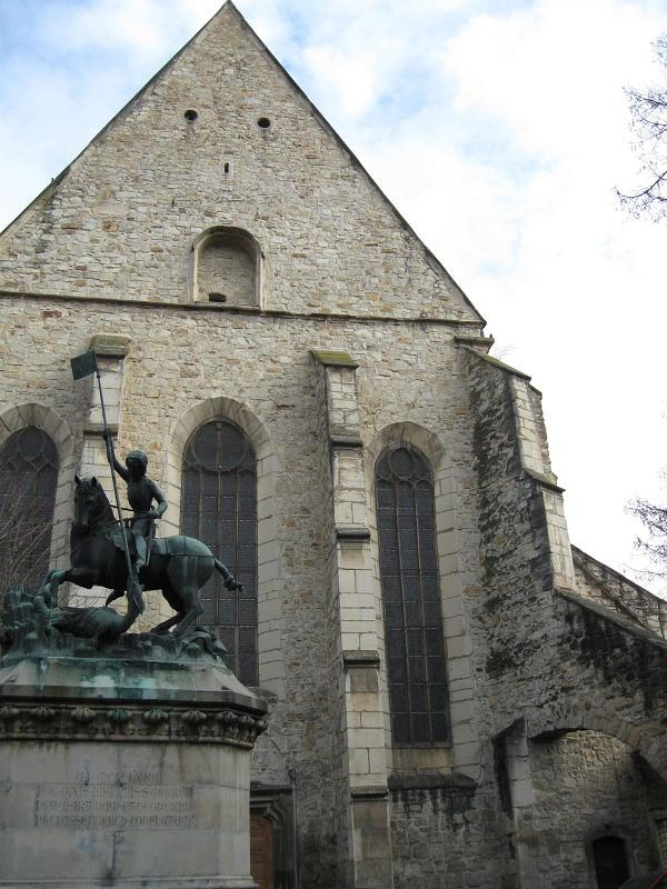 Cluj-Napoca, Biserica Reformată-Calvină (str. M.Kogălniceanu nr.21)